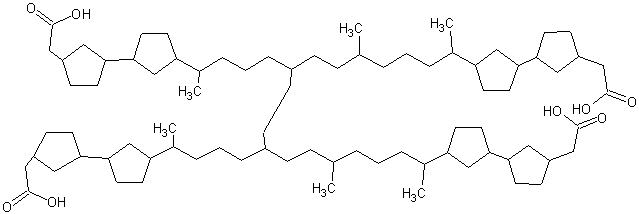 Химическая формула жирной карболовой кислоты